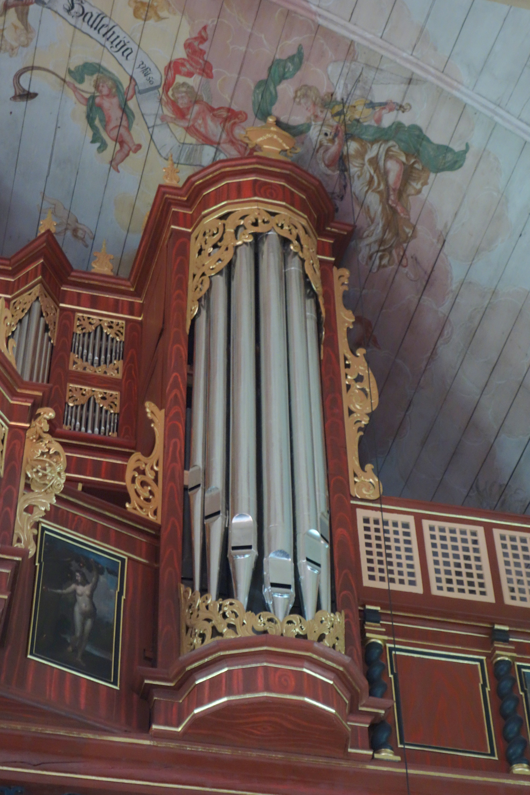 Orgel von St. Pankratius, Hamburg-Neuenfelde, Deutschland